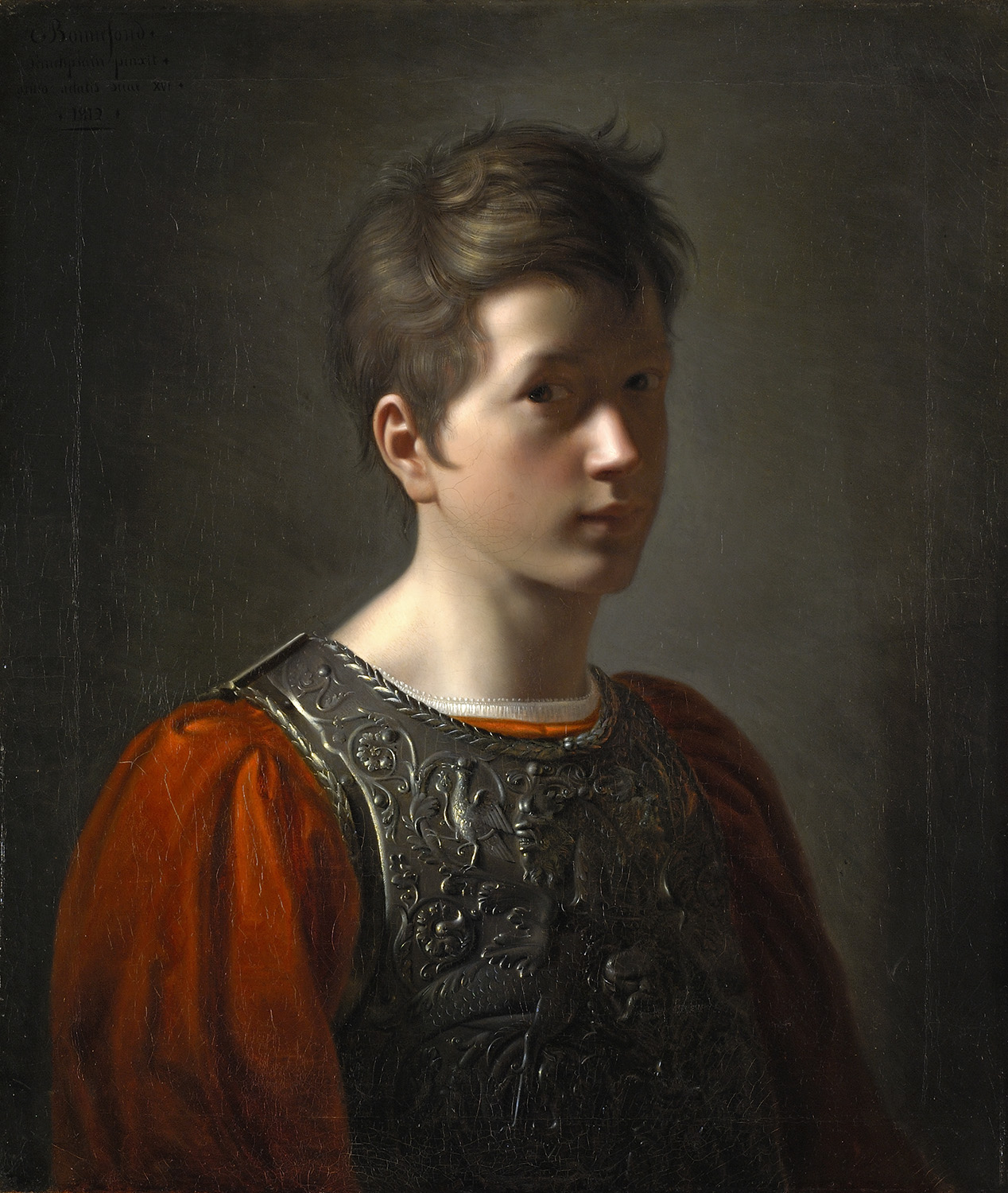 Peinture